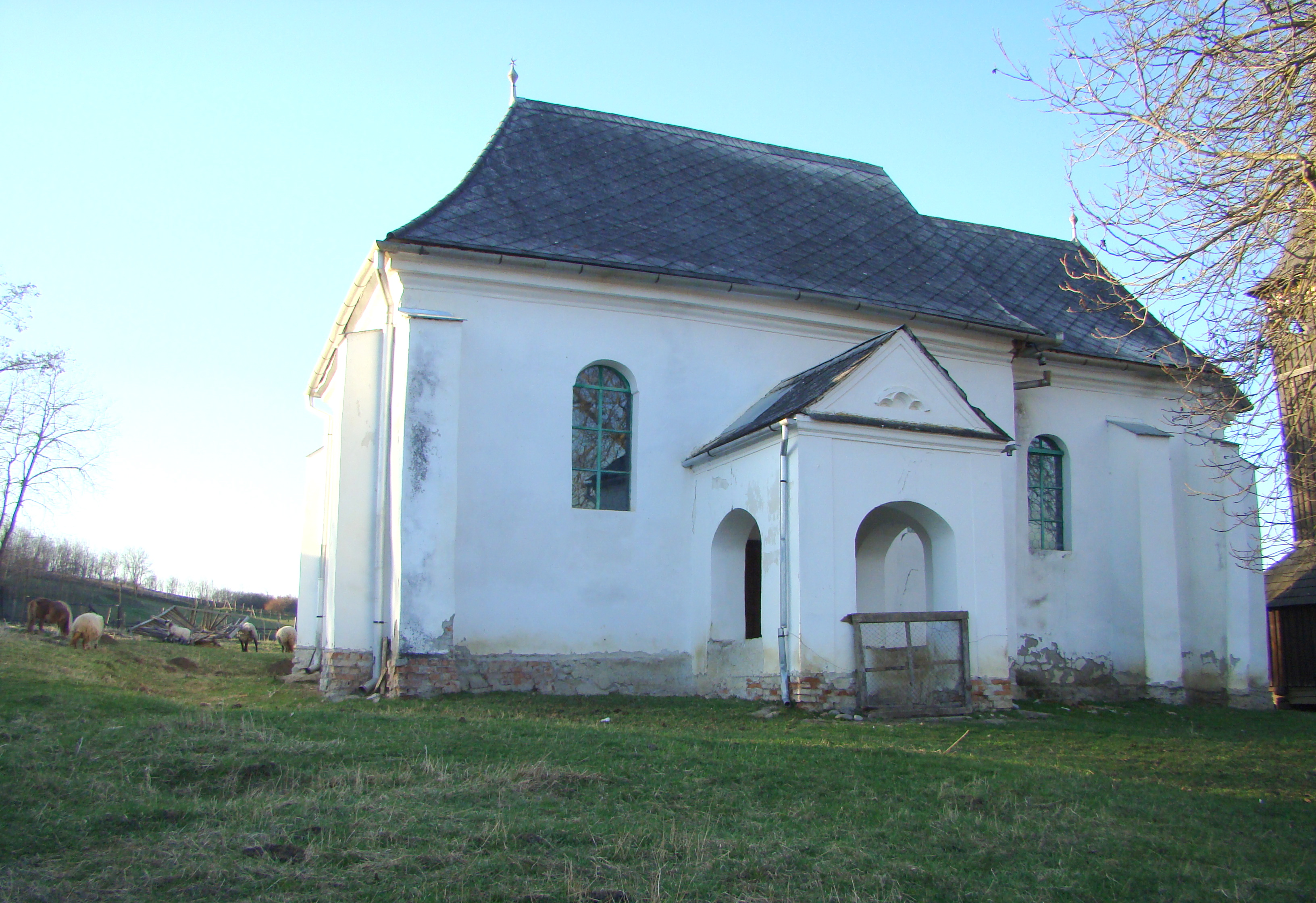 Biserica reformată, sat Ercea; comuna Băla 01